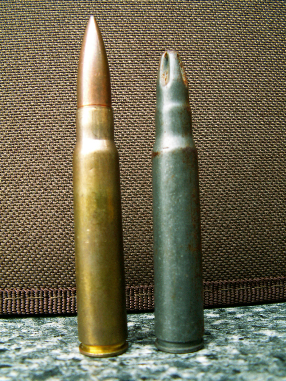 Levo navadni vojaški naboj, desno manevrski naboj 7,9 x 57.